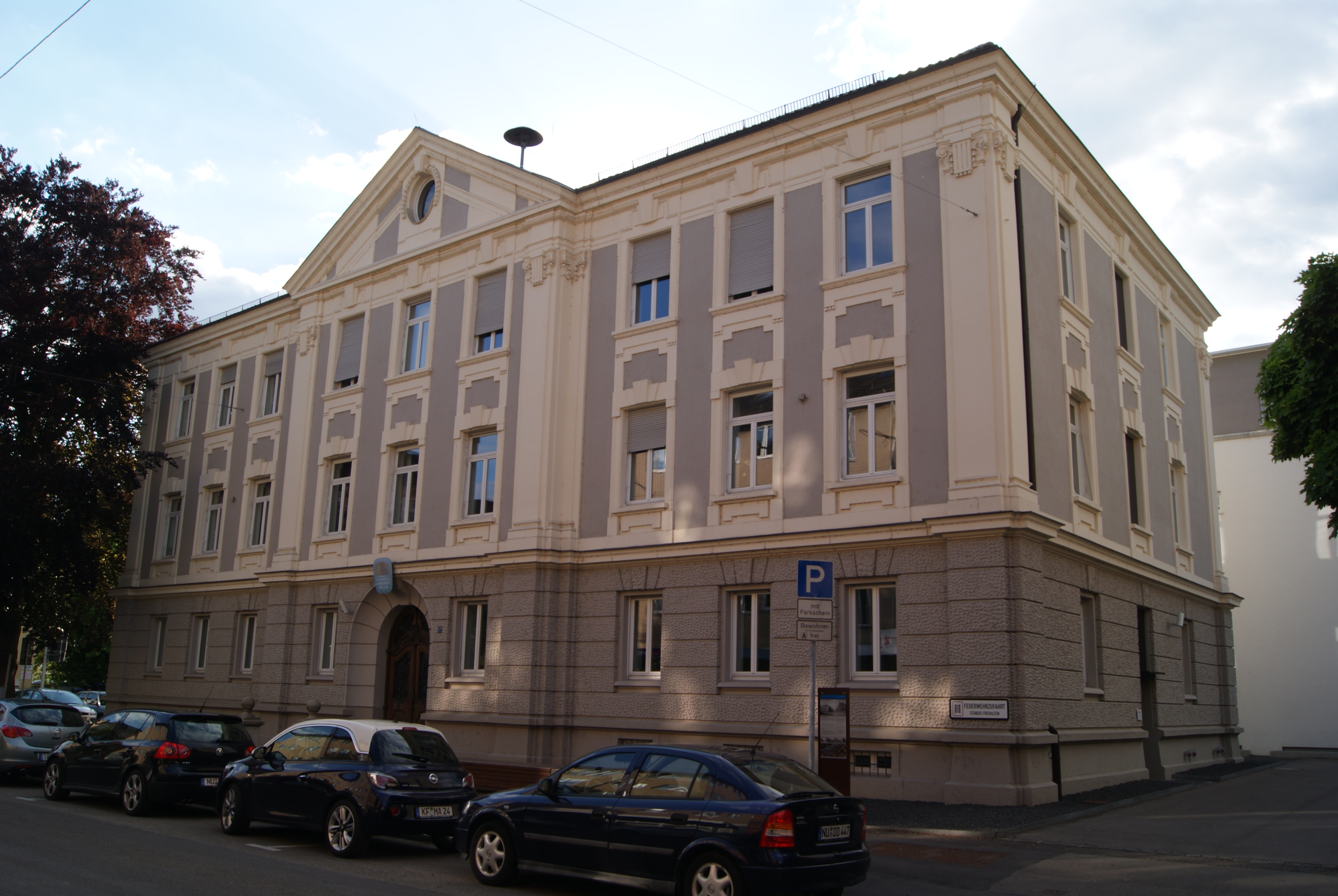 Amtsgericht. Dreigeschossiger Walmdachbau mit Pilastergliederung, Mittelrisalit und Dreiecksgiebel und Stuckdekorationen, 1898/99This is a photograph of an architectural monument.